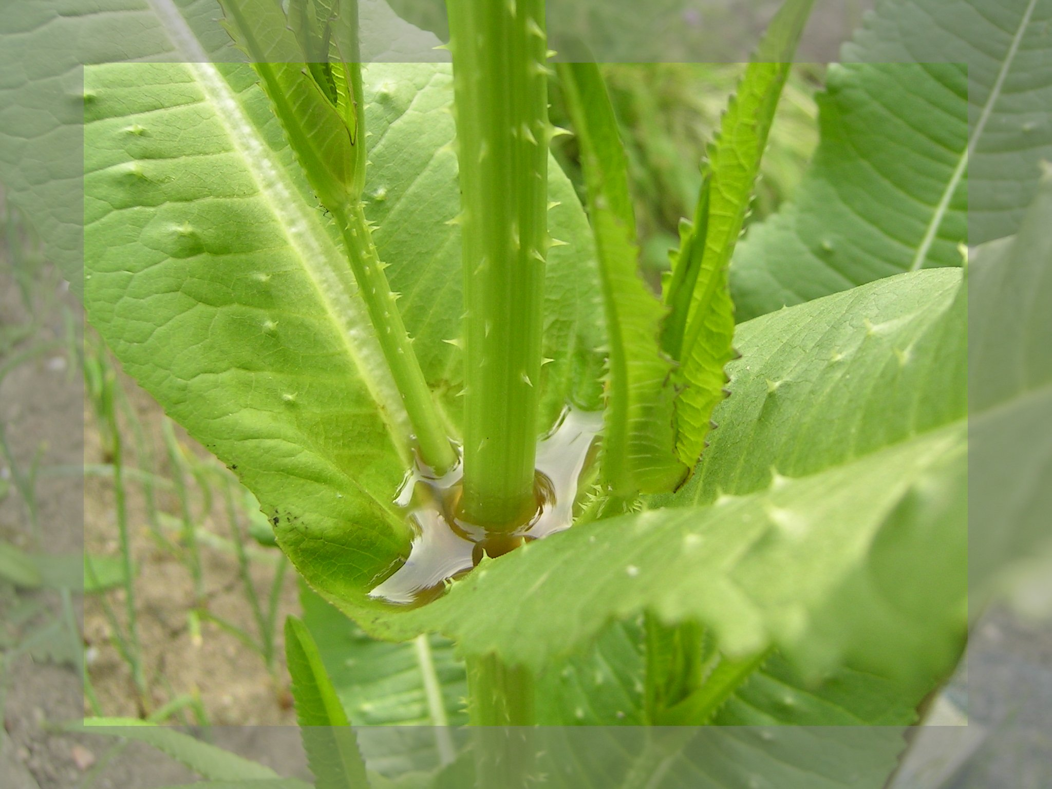 Wilde Karde, Dipsacus fullonum, mit Regenwasser in den Blättern.